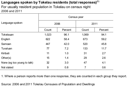 Languages spoken by Tokelau residents, 2011